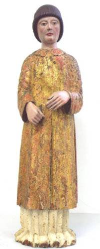 bottega di Domenico da Tolmezzo (fine XV secolo) Santo Diacono Legno intagliato - H 87 cm Museo Diocesano - Udine